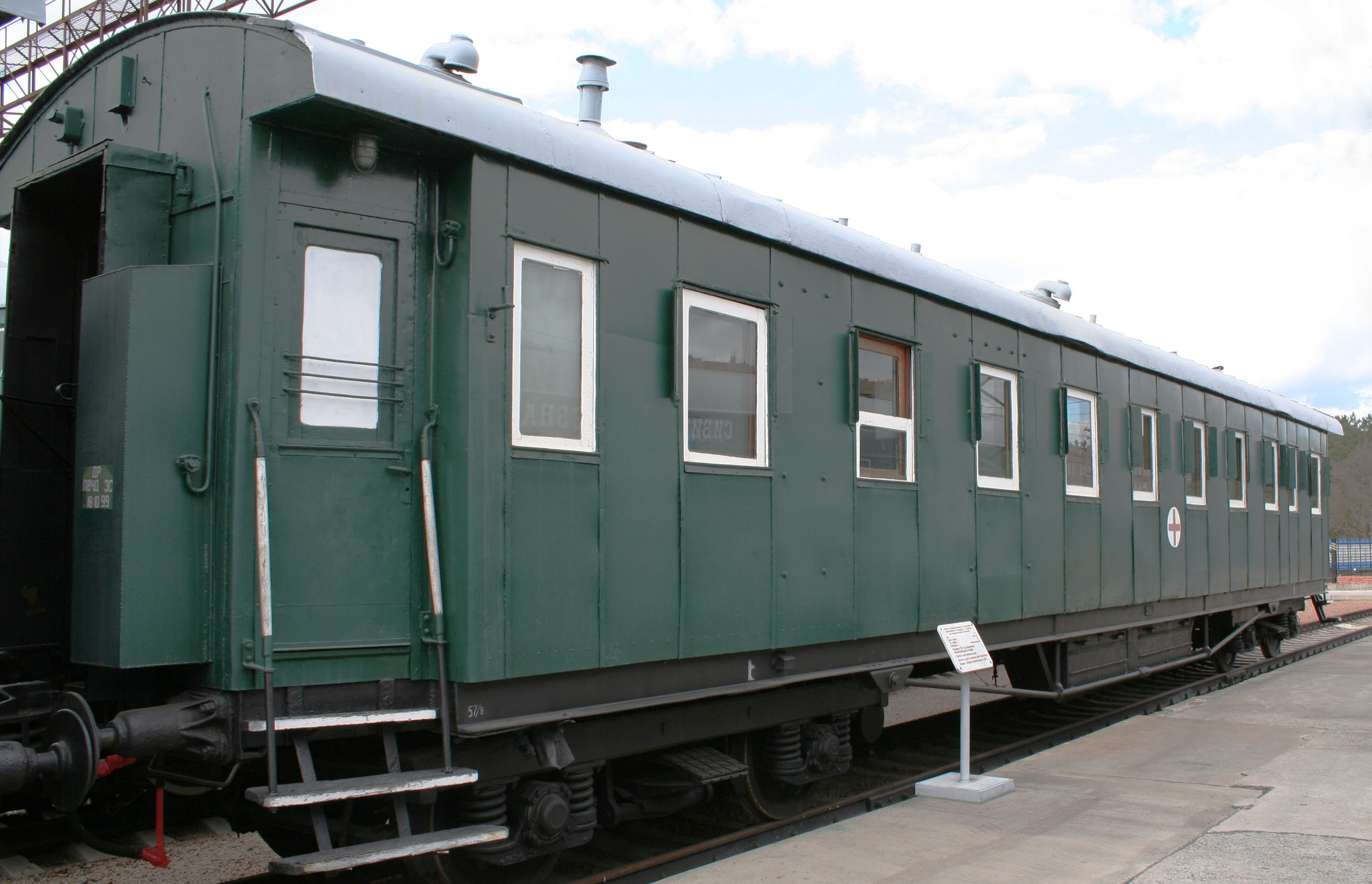 Вагон-операционная из состава санитарного поезда, 4-осный на подшипниках качения, построен в 1937 году